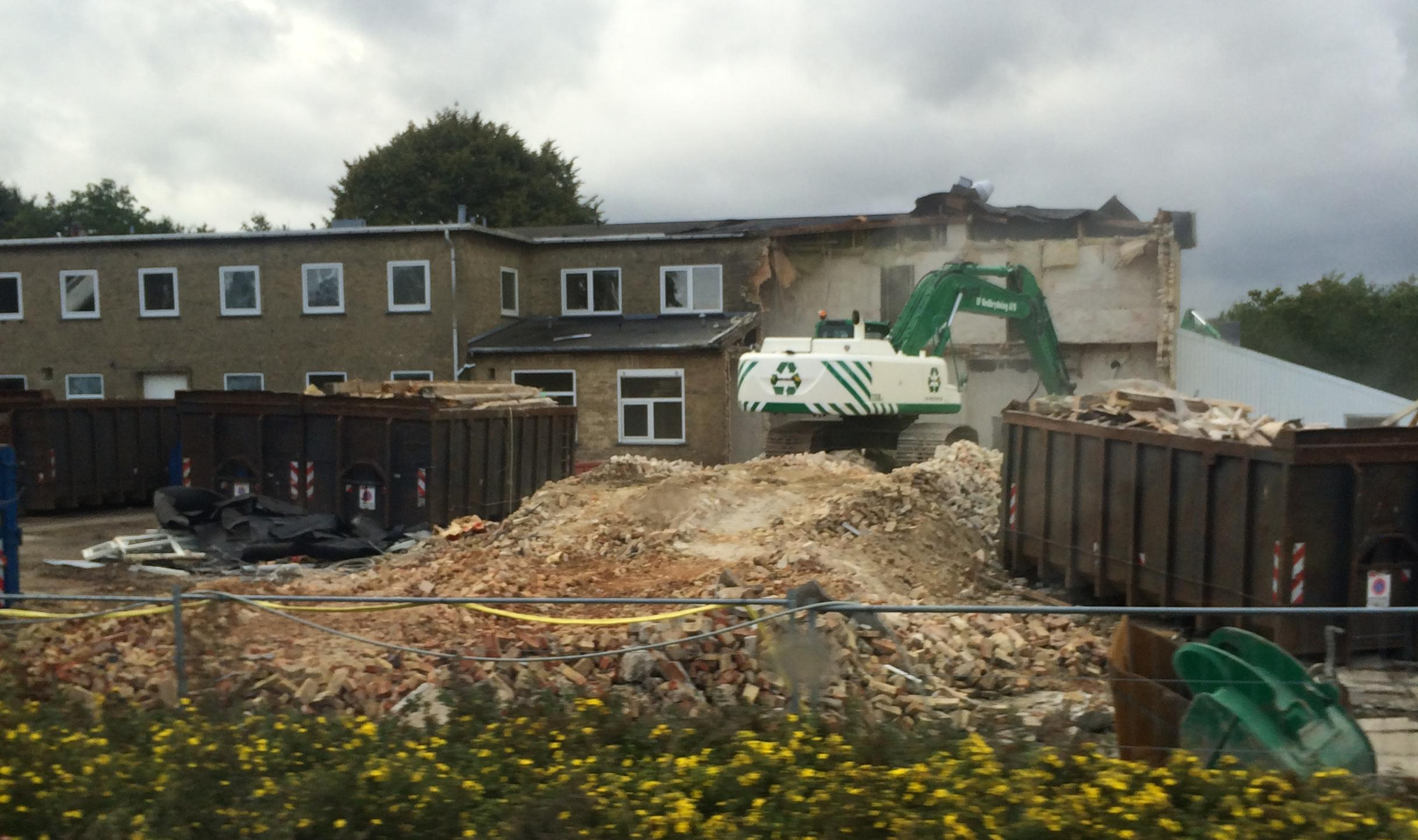 Terndrup Sygehus